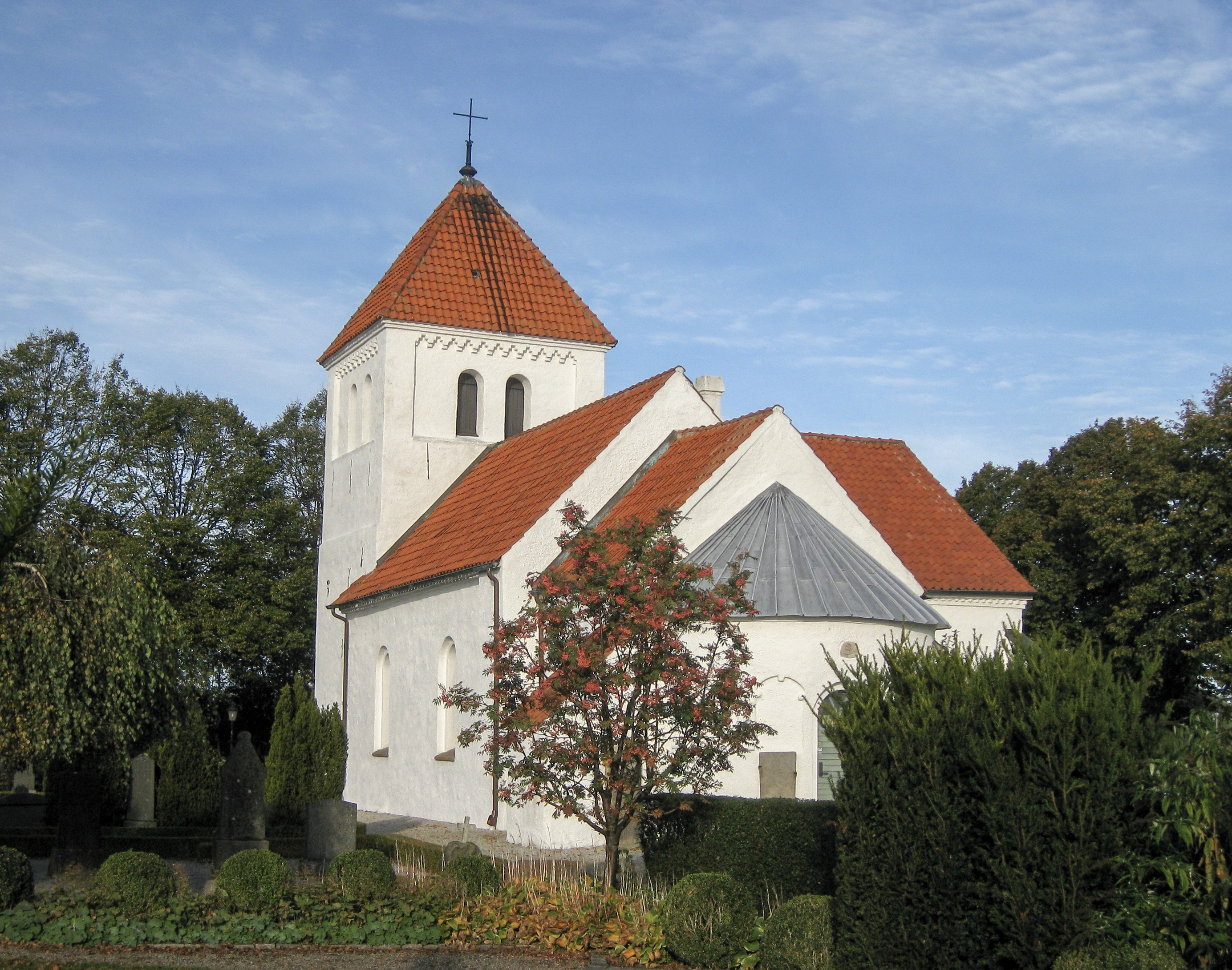 Hofterups kyrka